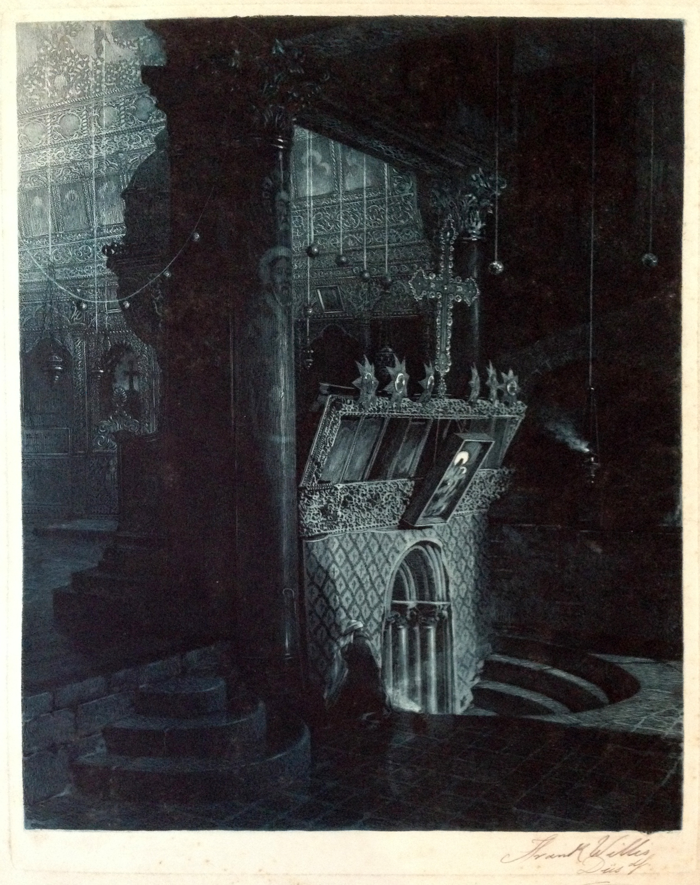 Ätz-Radierung mit Kaltnadel und Kupferstich Innenraum einer Kathedrale von Frank Willis, Düsseldorf um 1895